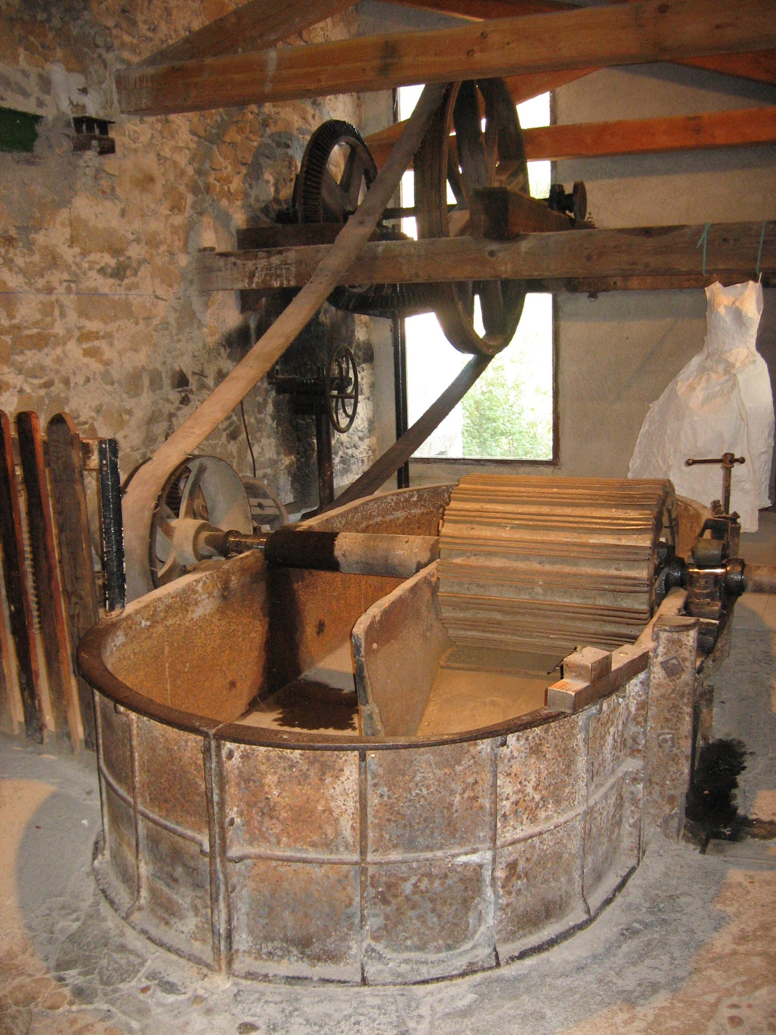 Photo de la pile hollandaise